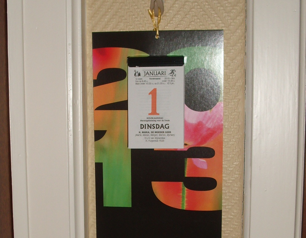 De Druivelaar - kalender - Izegem - West-Vlaanderen - België